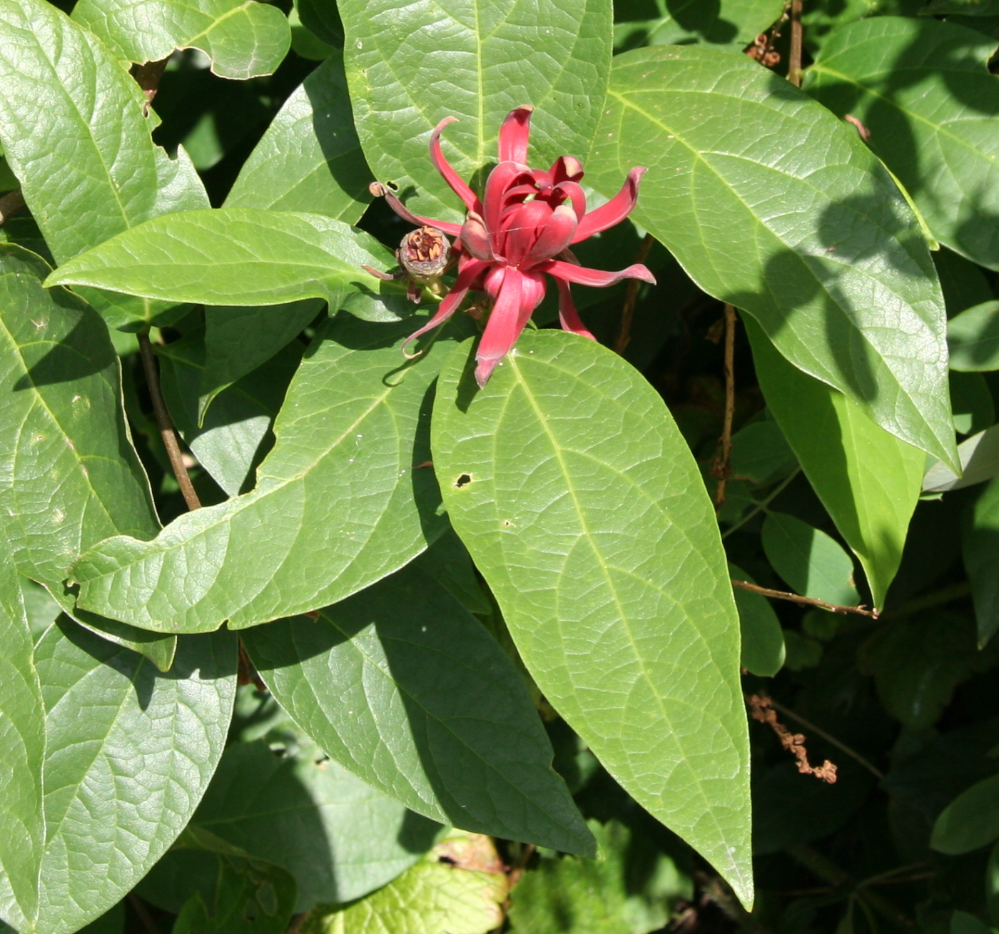 Calycanthus occidentalis im Botanischen Garten Dresden